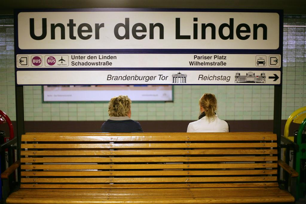 Na peronie stacji S-bahn Unter den Linden. fot.: Cezary Piwowarski